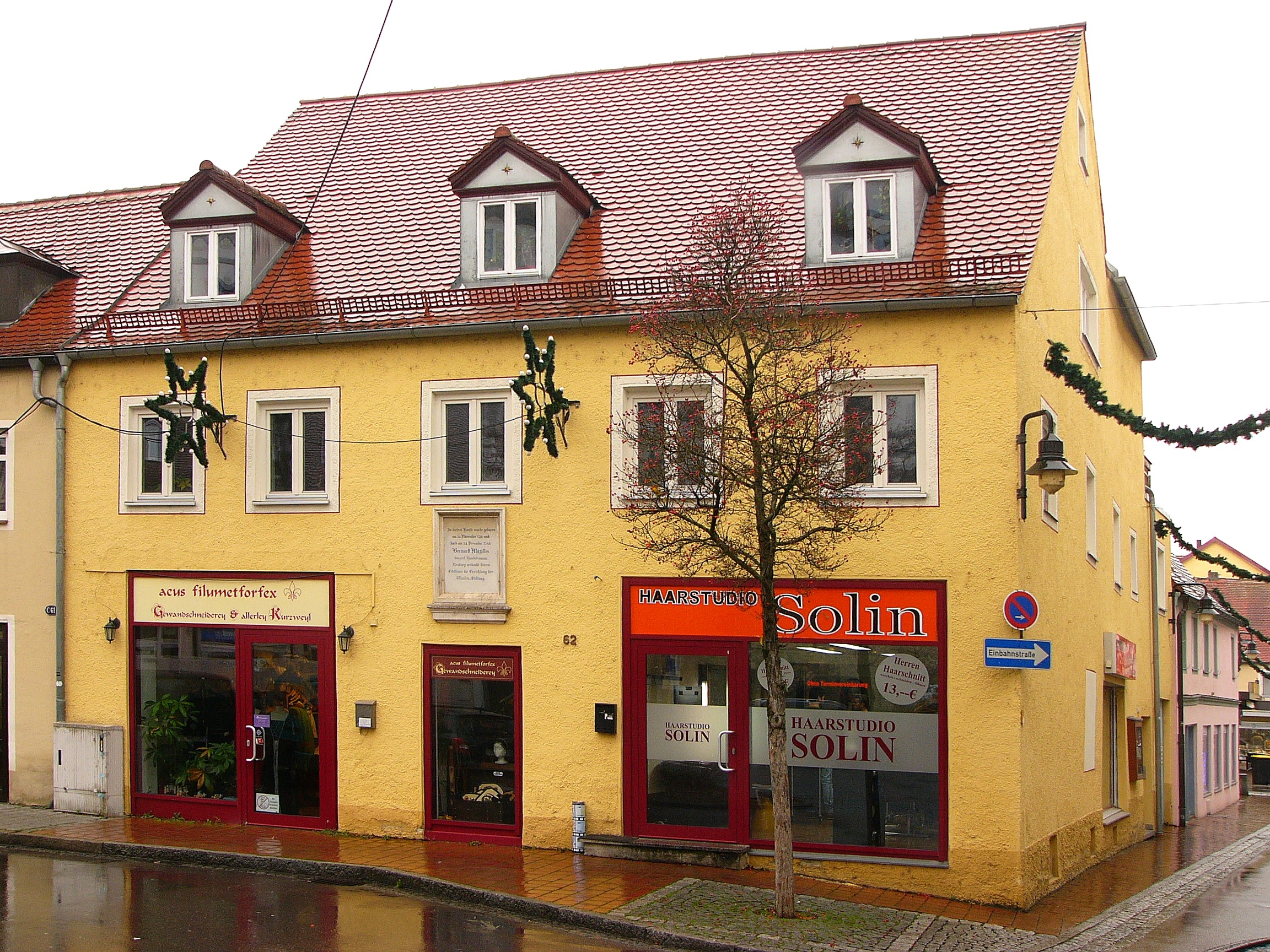 Geburtshaus von Bernhard Mazillis in Neuburg an der Donau